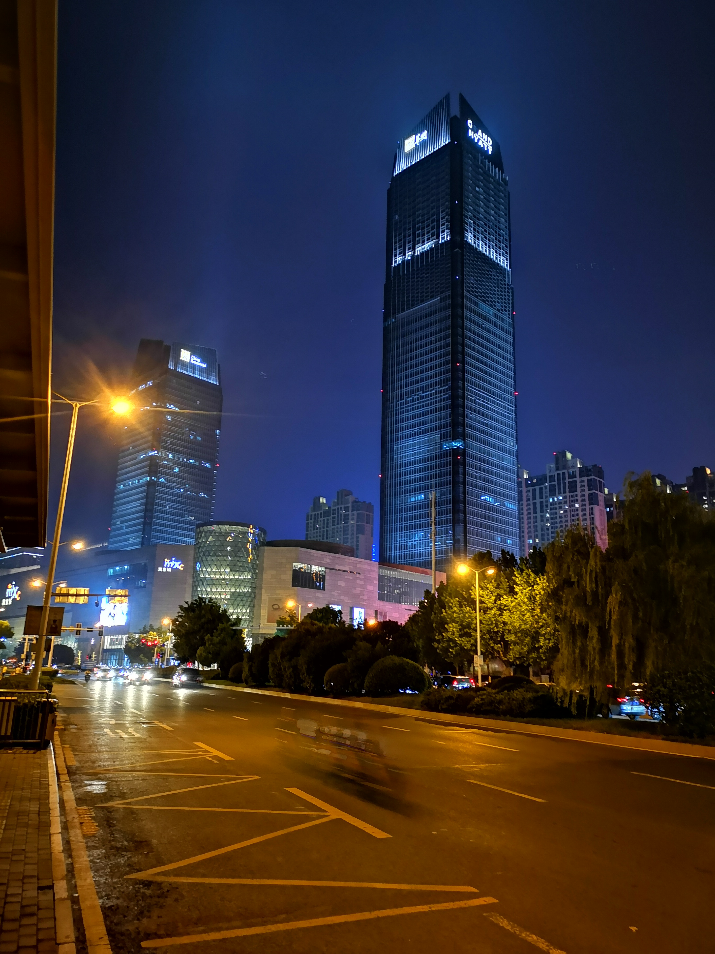 合肥华润中心